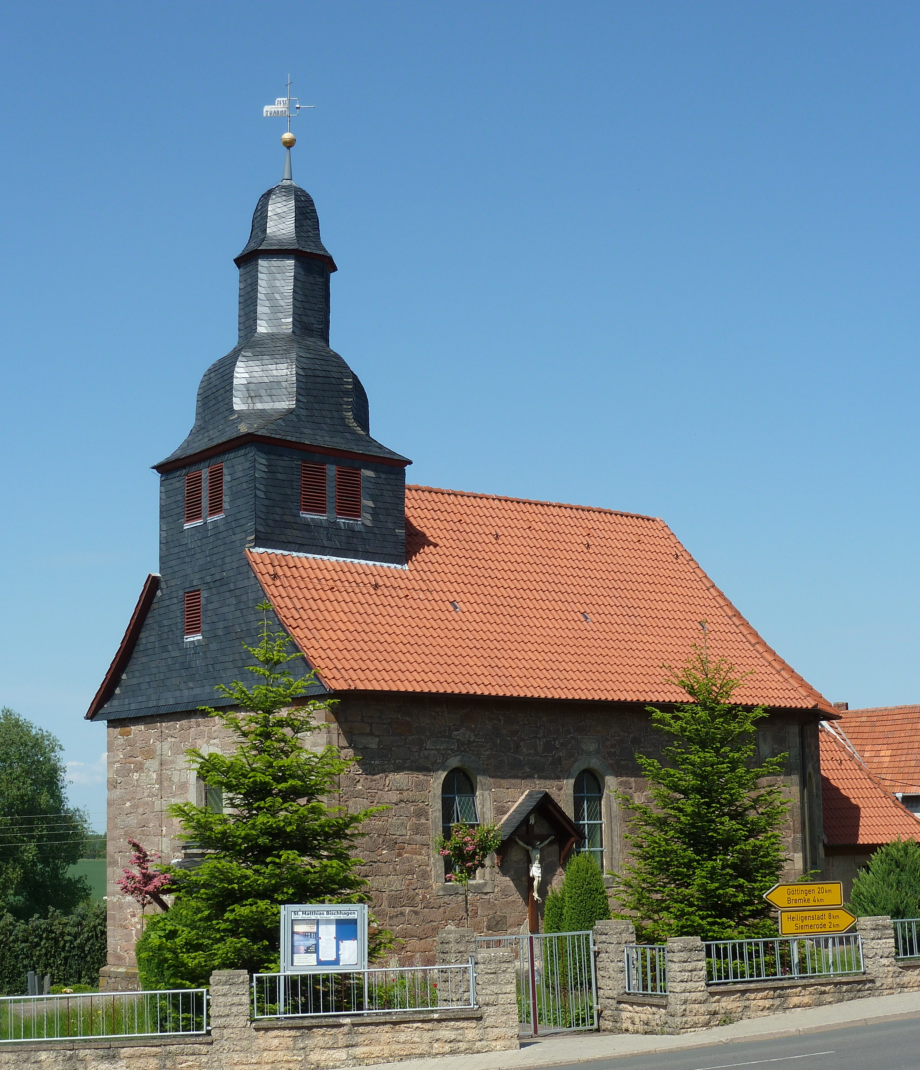 Katholische Kirche in Bischhagen, Gemeinde Hohes Kreuz, Eichsfeld. Erbaut 1731 lt. Turmfahne